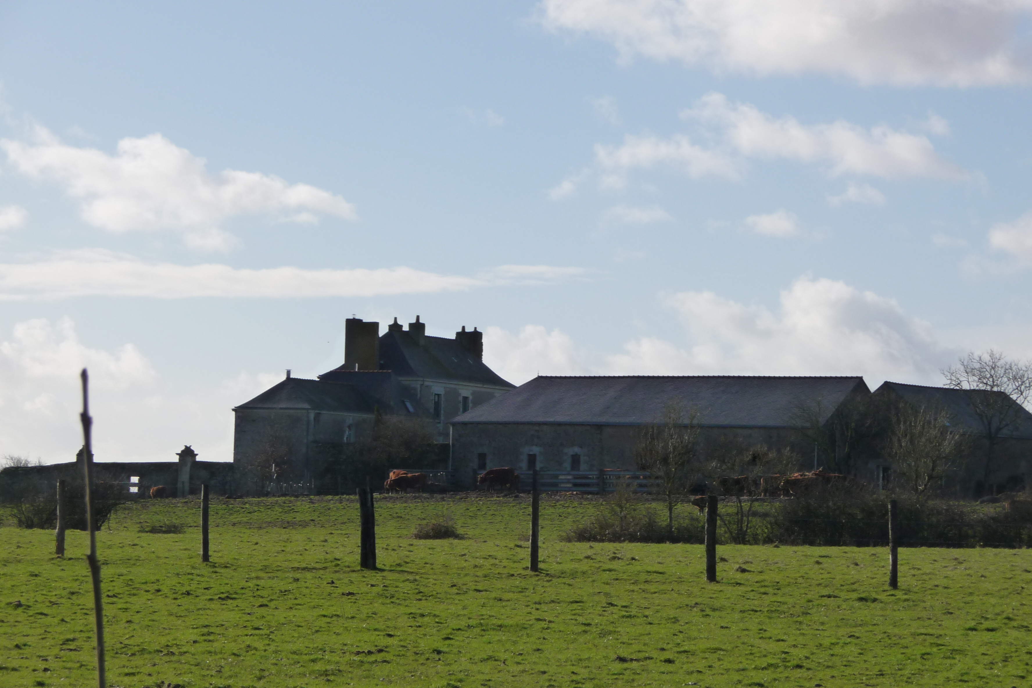 Manoir de Mareil